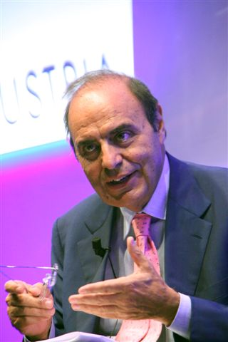 Italian presenter Bruno Vespa